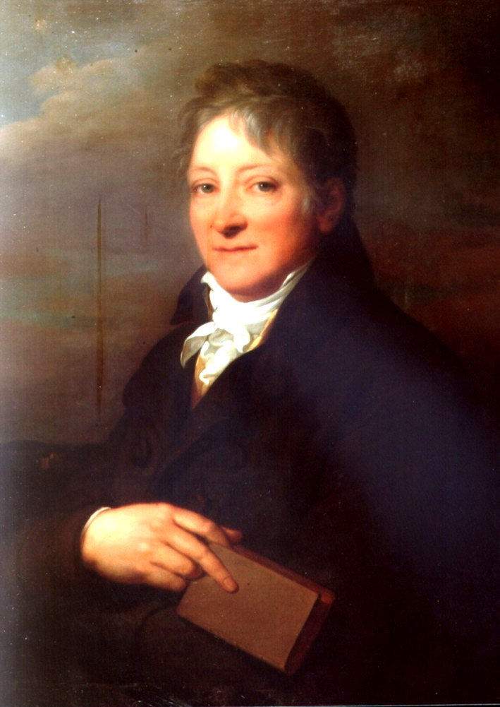 Hans Wilhelm von Thümmel, nach Grassi (Josef Mathias Grassi?